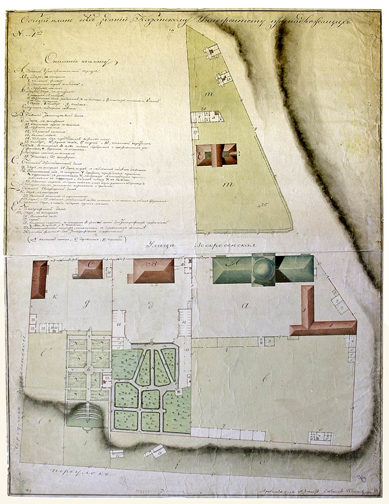 Петровский С. Общий план всех зданий Императорского Казанского университета. Казань. 1830-е. Бумага, акварель, тушь, перо.